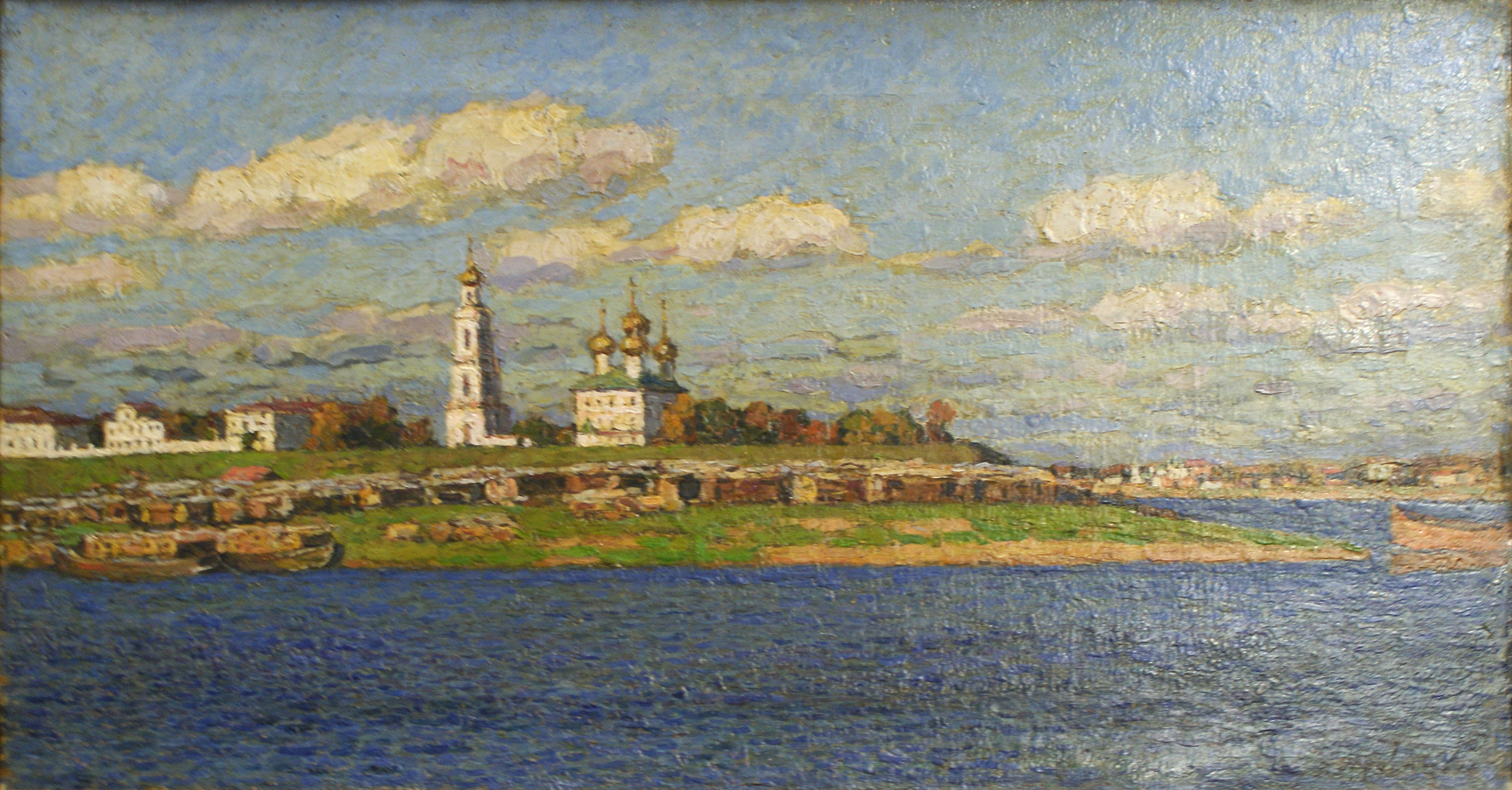 Яраслаўль. Палатно, алей